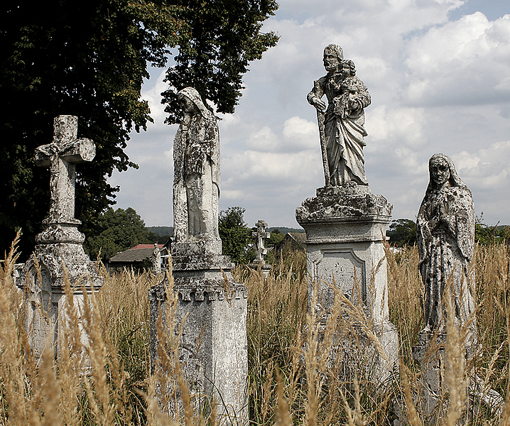 ukrainian+cemeterz+nove+brusno